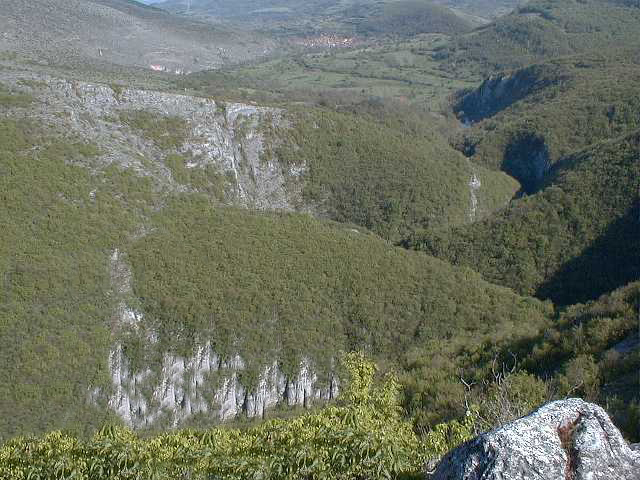 Владикине плоче